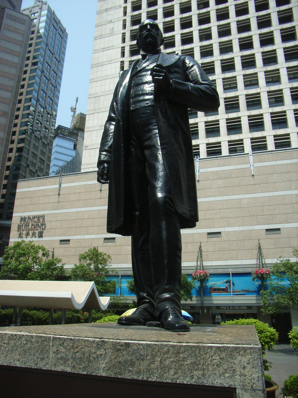 Statue Square 皇后像廣場 is a public pedestrian square in Central, HK